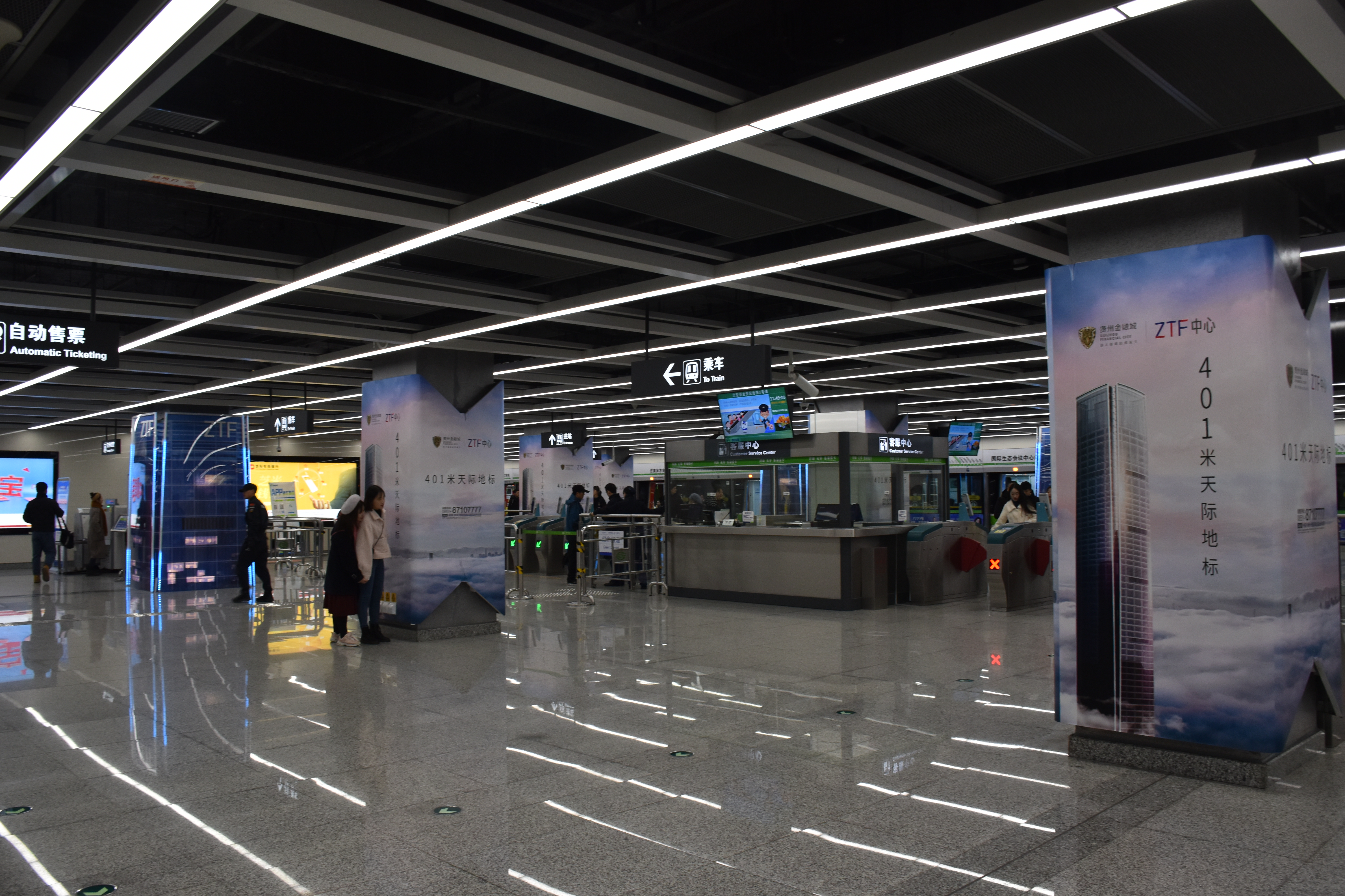 贵阳轨道交通1号线 国际生态会议中心站站厅 该站站厅与站台位于同层